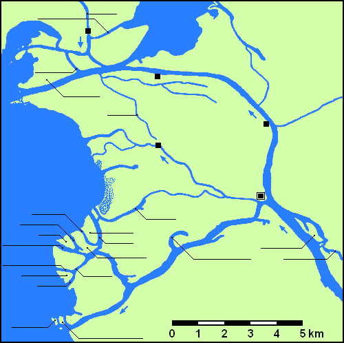 Česky: Delta řeky Němen (Nová verze)